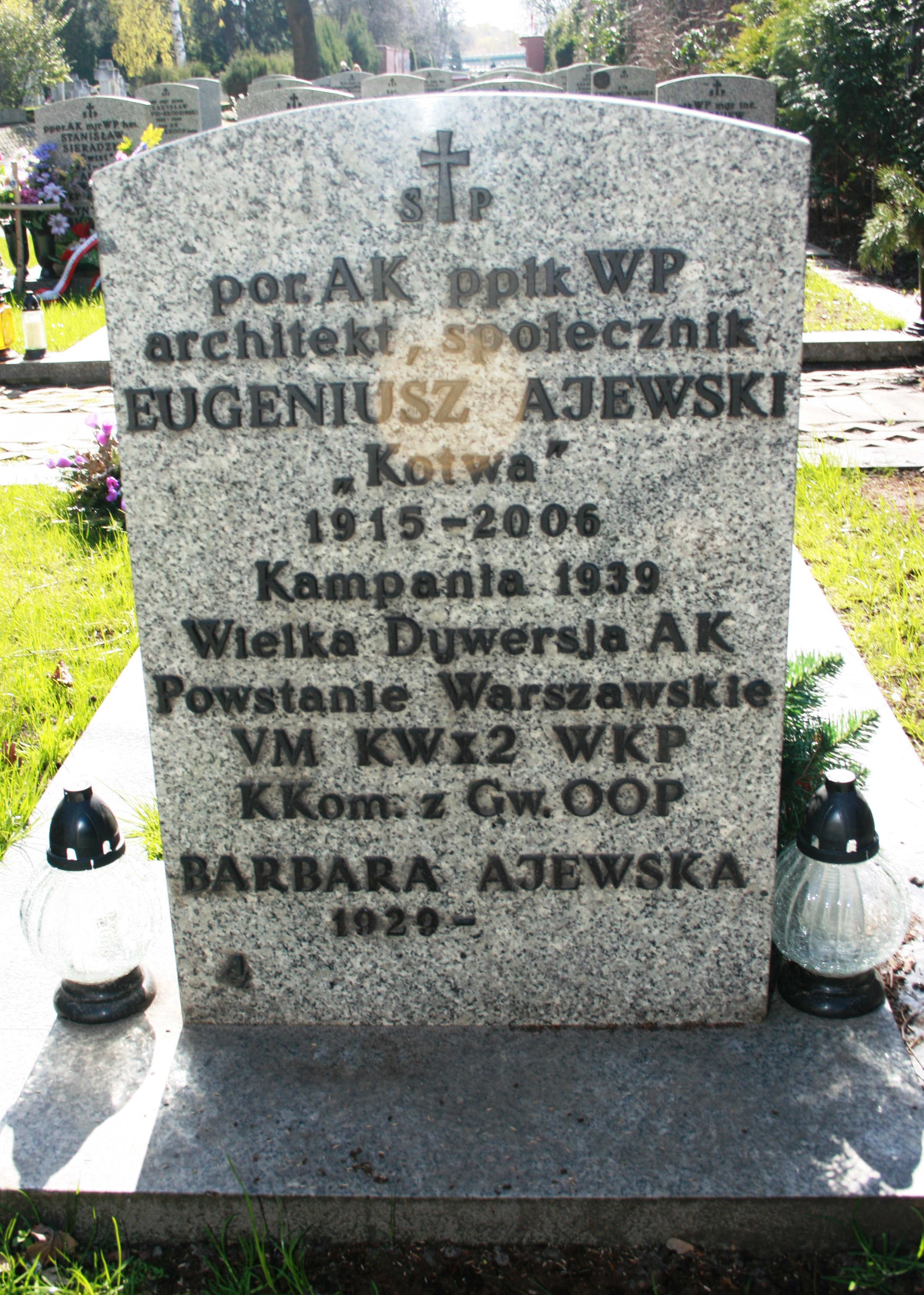 Grób w Panteonie Żołnierzy Polski Walczącej (kwatera D18) na Cmentarzu Wojskowym w Warszawie